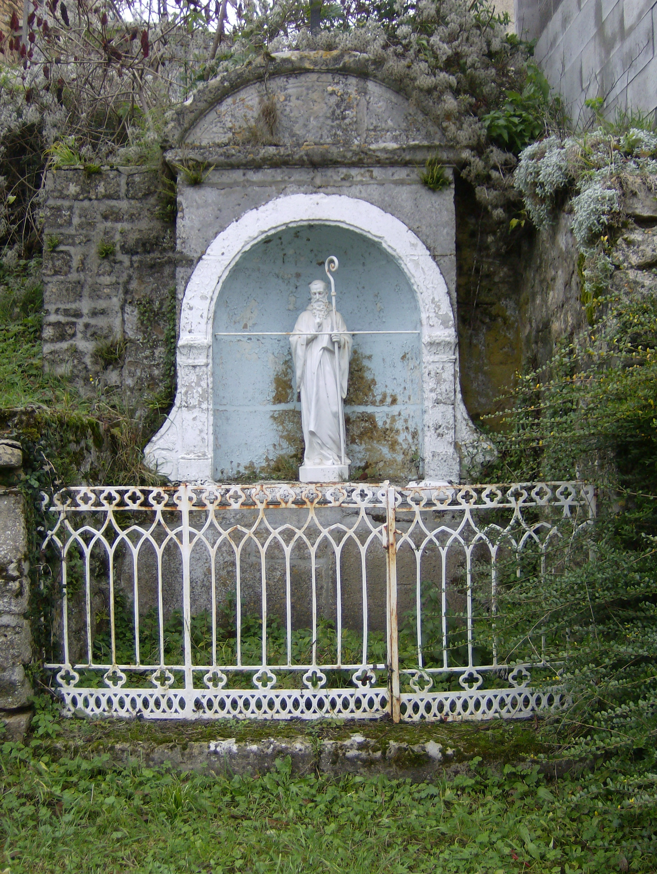 Saint Méen est le saint protecteur du village de Haraucourt dans les Ardennes (08).